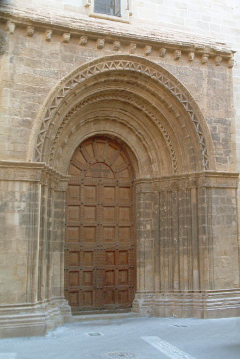 Portalada de l'església arxiprestal de Gandesa